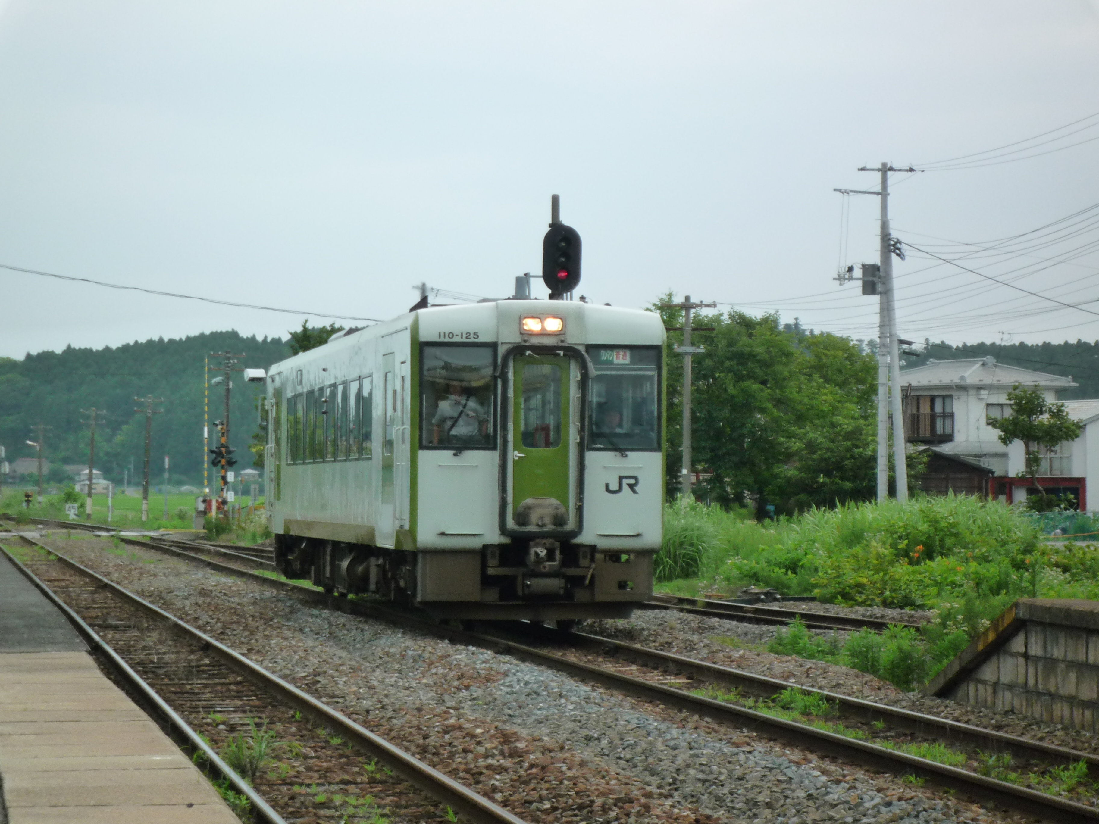 駅に到着する気仙沼線下り列車